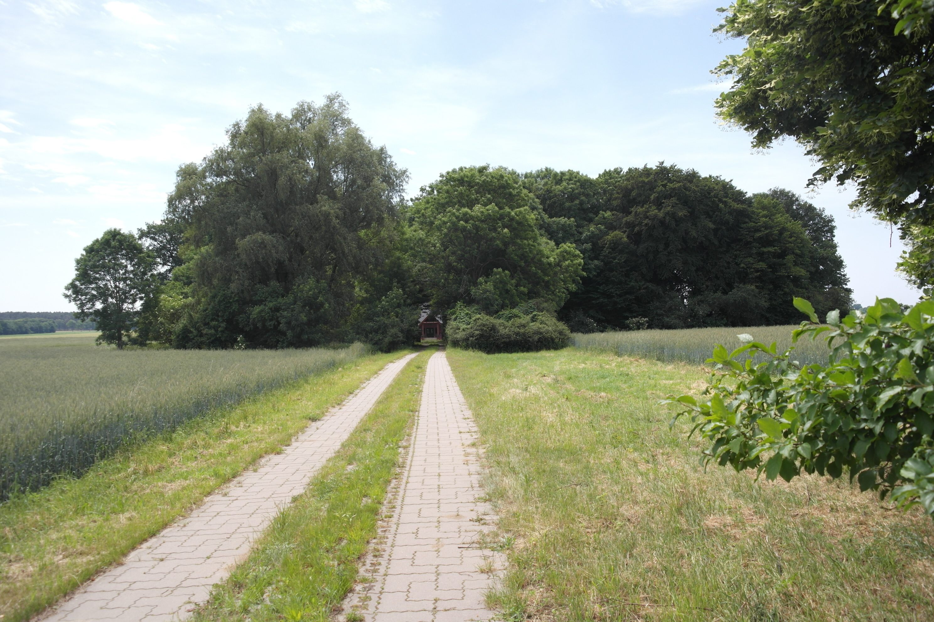 kleiner Wohnplatz Marienhof, am Meynbach, Gemeinde Prislich